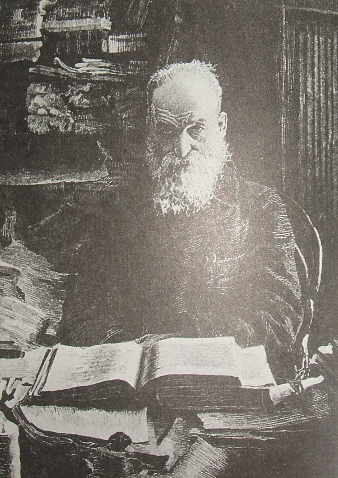 Лесгафт на открытке 1910 года